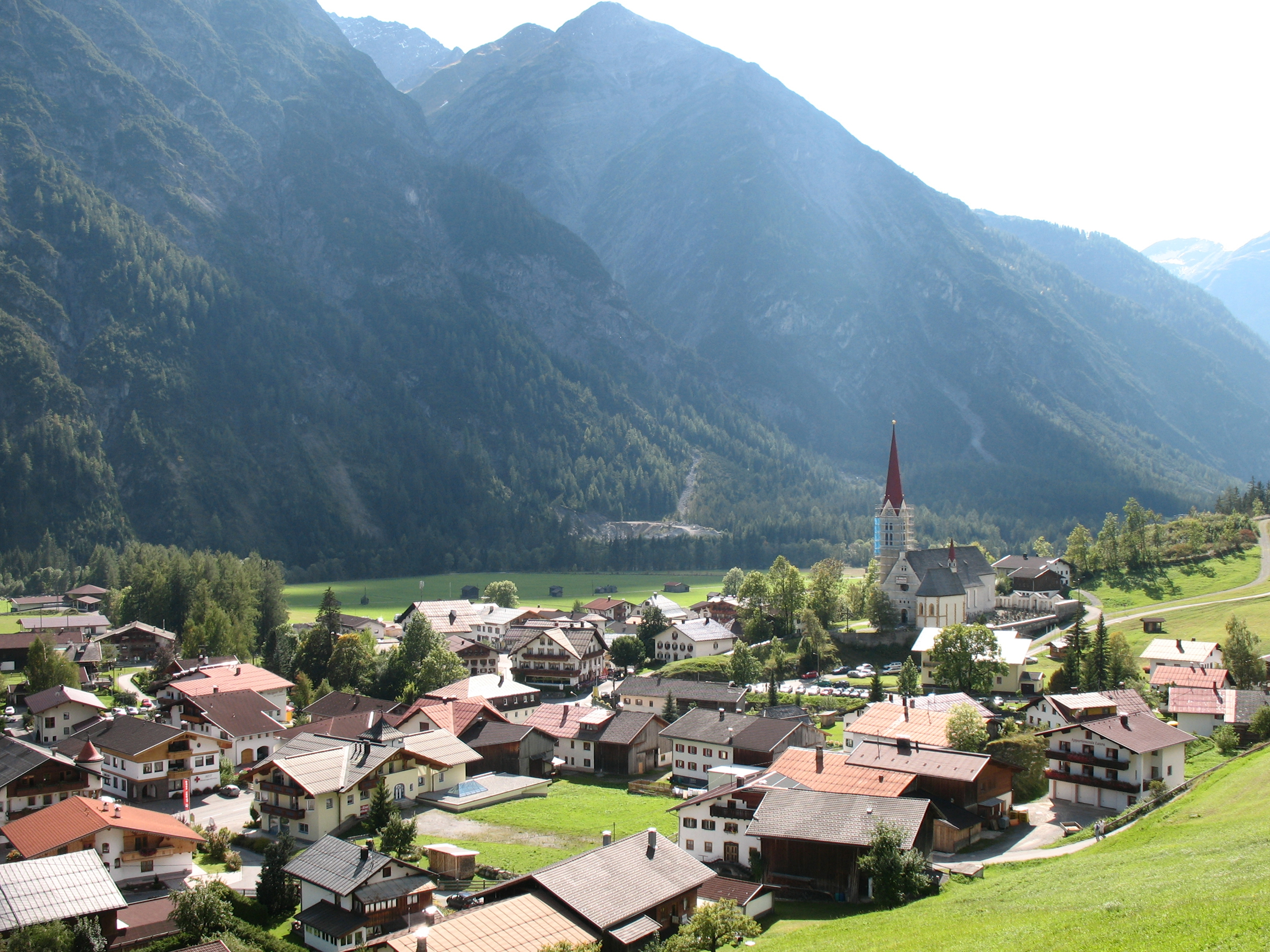 Blick nach Nordwesten über Holzgau mit der Pfarrkirche Maria Himmelfahrt im Lechtal. Dahinter sind die Lechtaler Alpen mit dem Zwölferkopf (2310 m) zu sehen.